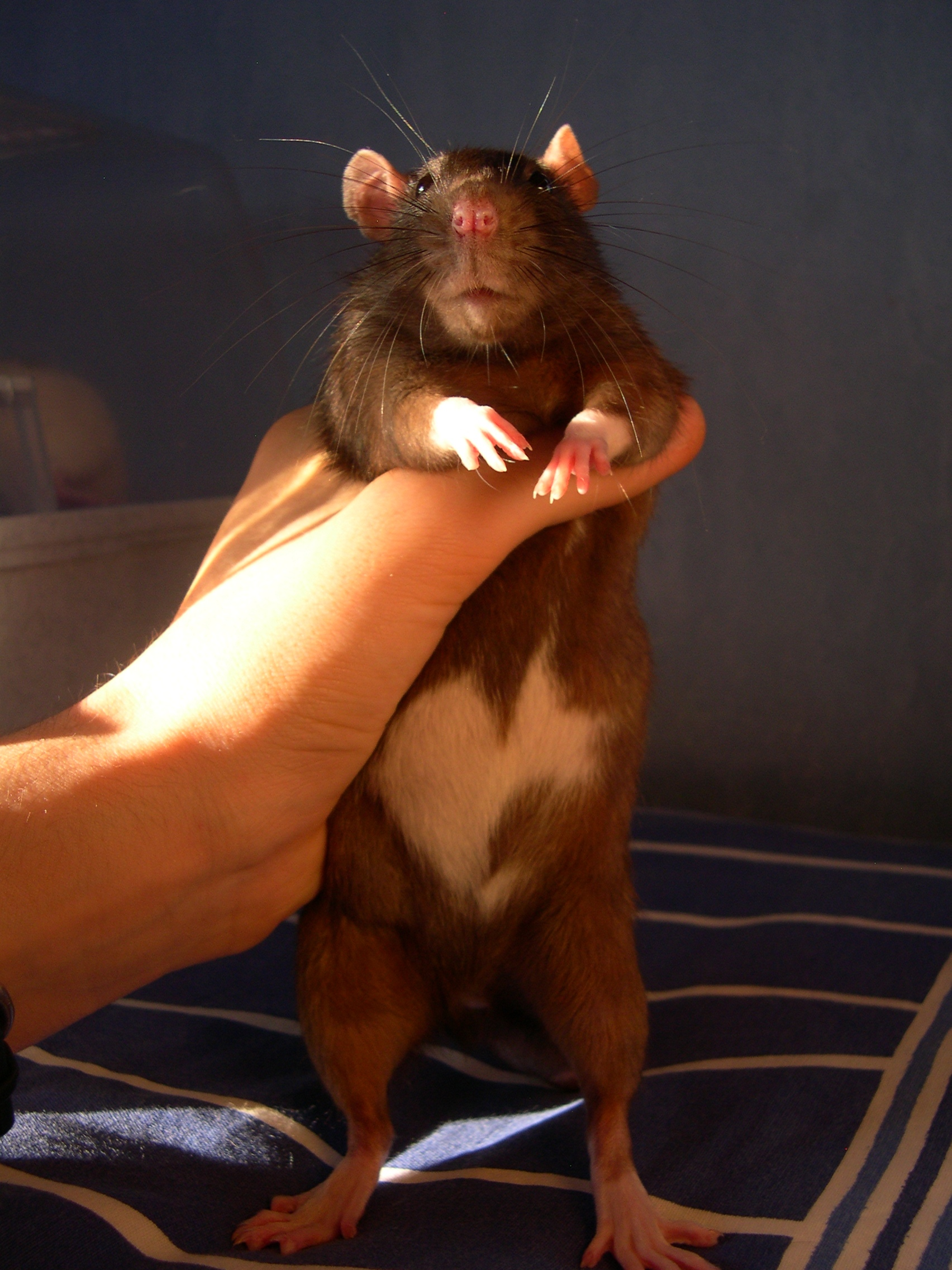 Rate noir irish (pattes blanches, tache blanche sur le ventre, poil noir lisse)